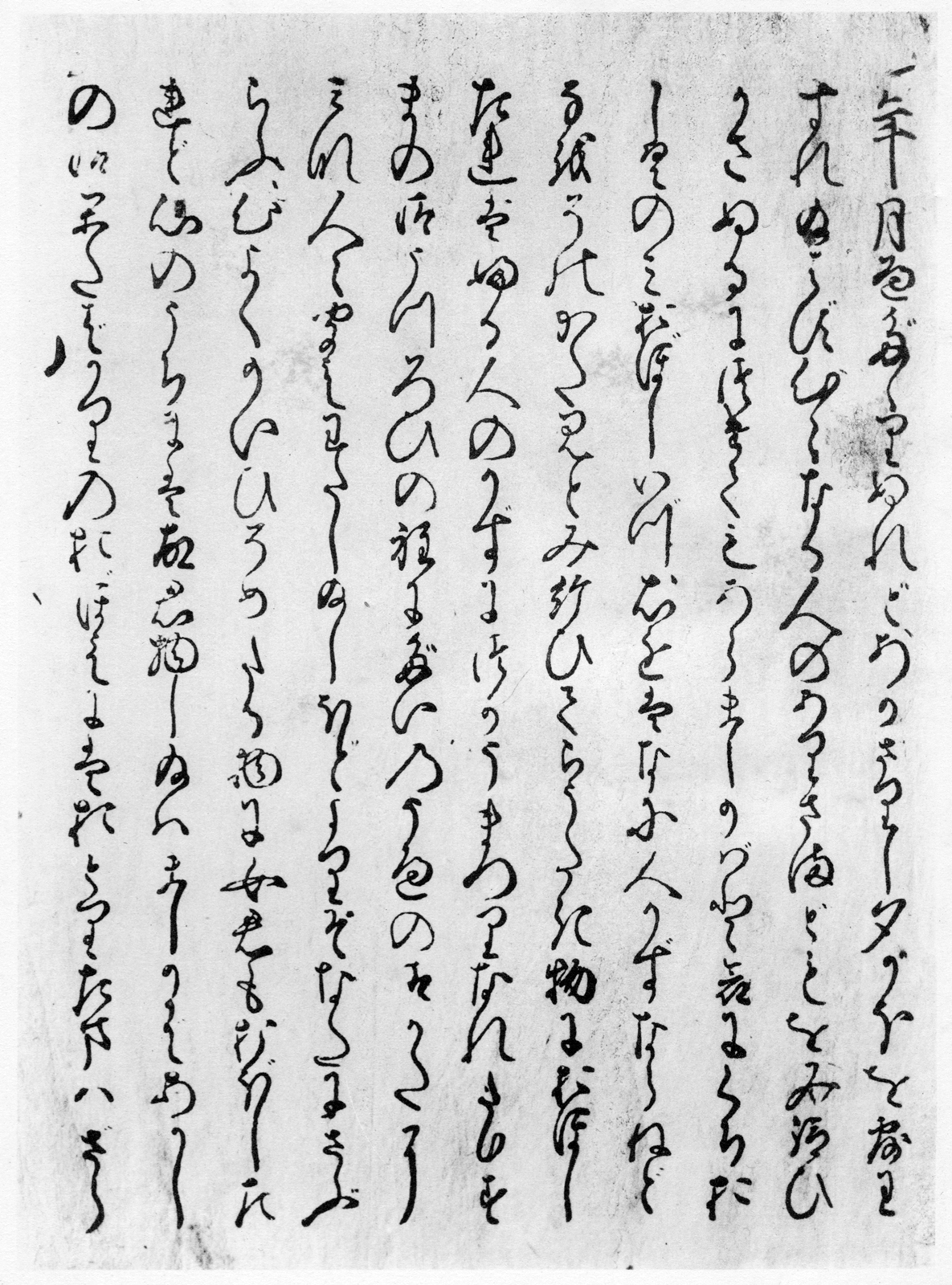 慶長木活本玉鬘巻。『定本源氏物語新解』中巻口絵より。